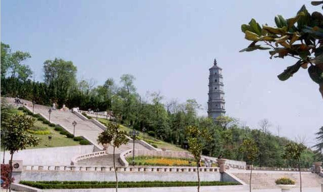 百牙塔